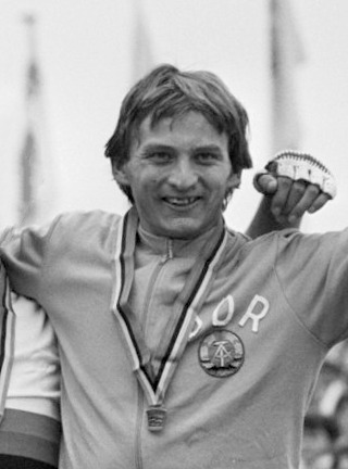 Wereldkampioenschappen Wielrennen 1979 te Valkenburg. Bernd Drogan